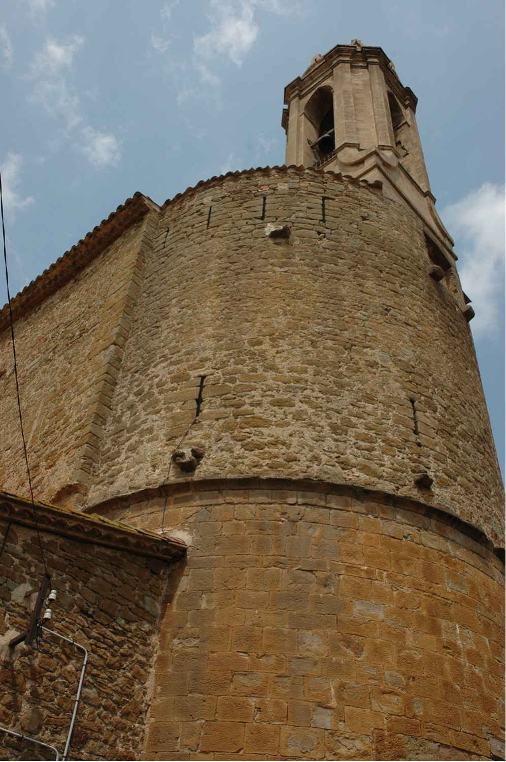 Església fortificada de Sant Feliu. Parlavà, Baix Empordà, Catalonia